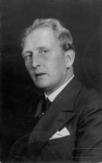 Тарас Шухевич (*1886 — †1991) — піаніст, професор Музичного інституту ім. М. Лисенка у Львові